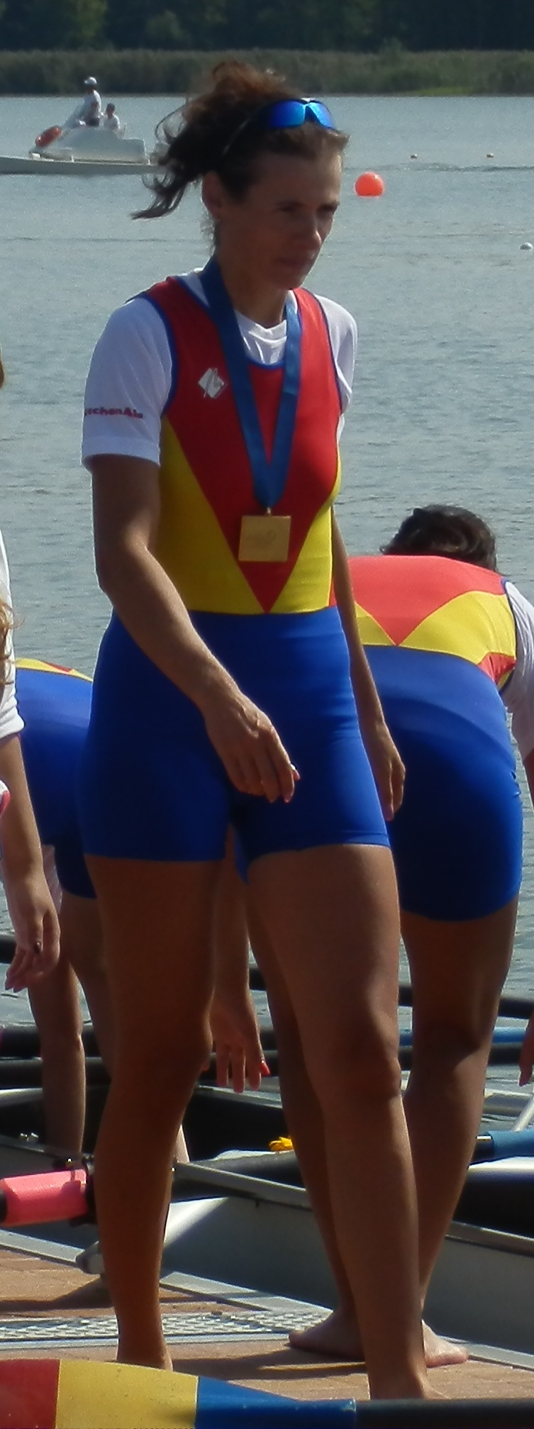 Viorica Susanu dopo la premiazione agli Europei di Varese 2012